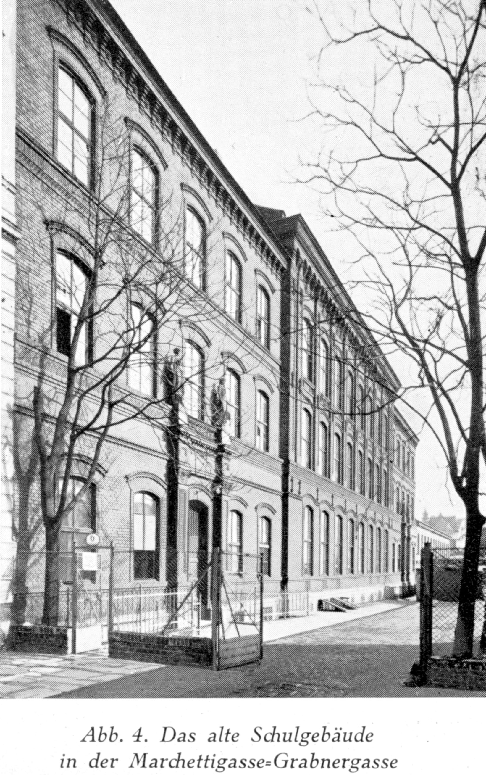 Altes Schulgebäude der HTBLVA Wien V in der Marchettigasse